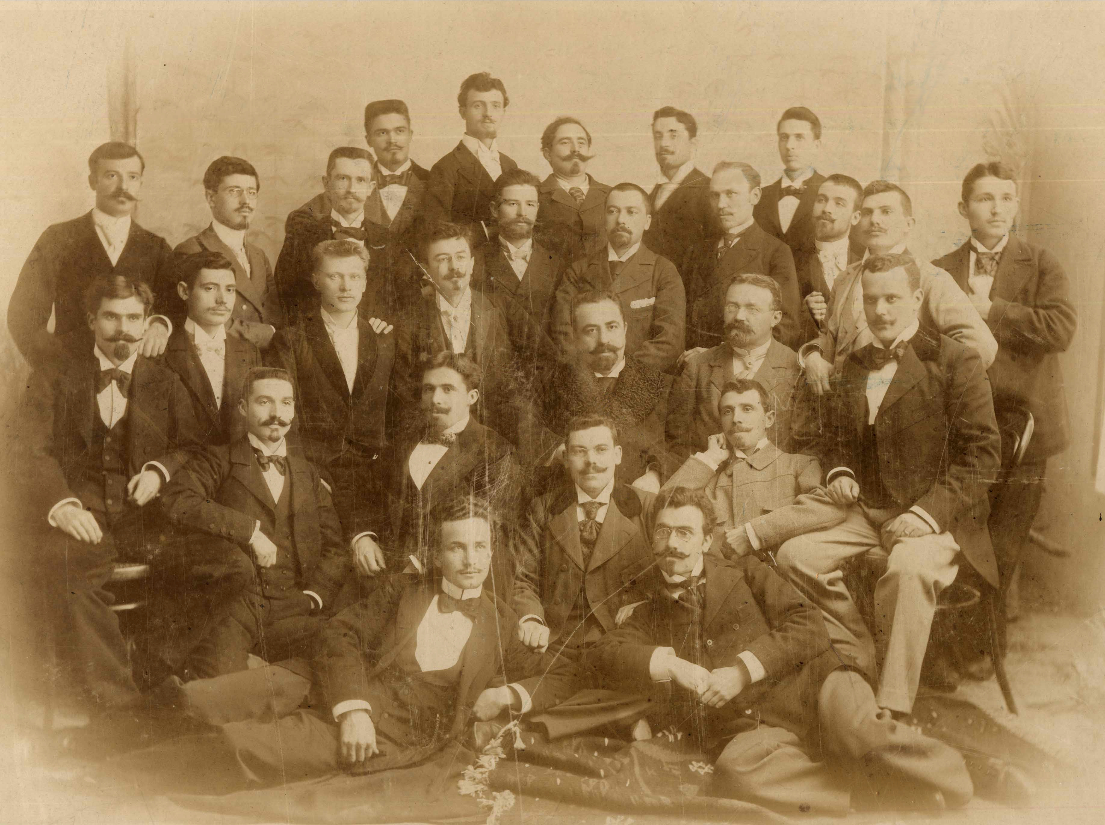 Гимнастическо дружество "Юнак" в Пловдив. На първия ред – Ангел Букорещлиев (вдясно долу). Седнали: (П.Мутафчиев ?, Никола Г.Стоянов (БНБ), Маргин, (? ), Д.Берберов (директор на Държавната мъжка гимназия в Пловдив), Антон Безеншек. Прави (първи ред) – художникът Рймонд Улрих (трети отдляво, с черна връзка), математикът Стефан Чолаков (пети отляво).